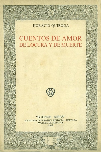 Cuentos de amor de locura y de muerte, portada de la primera edición.